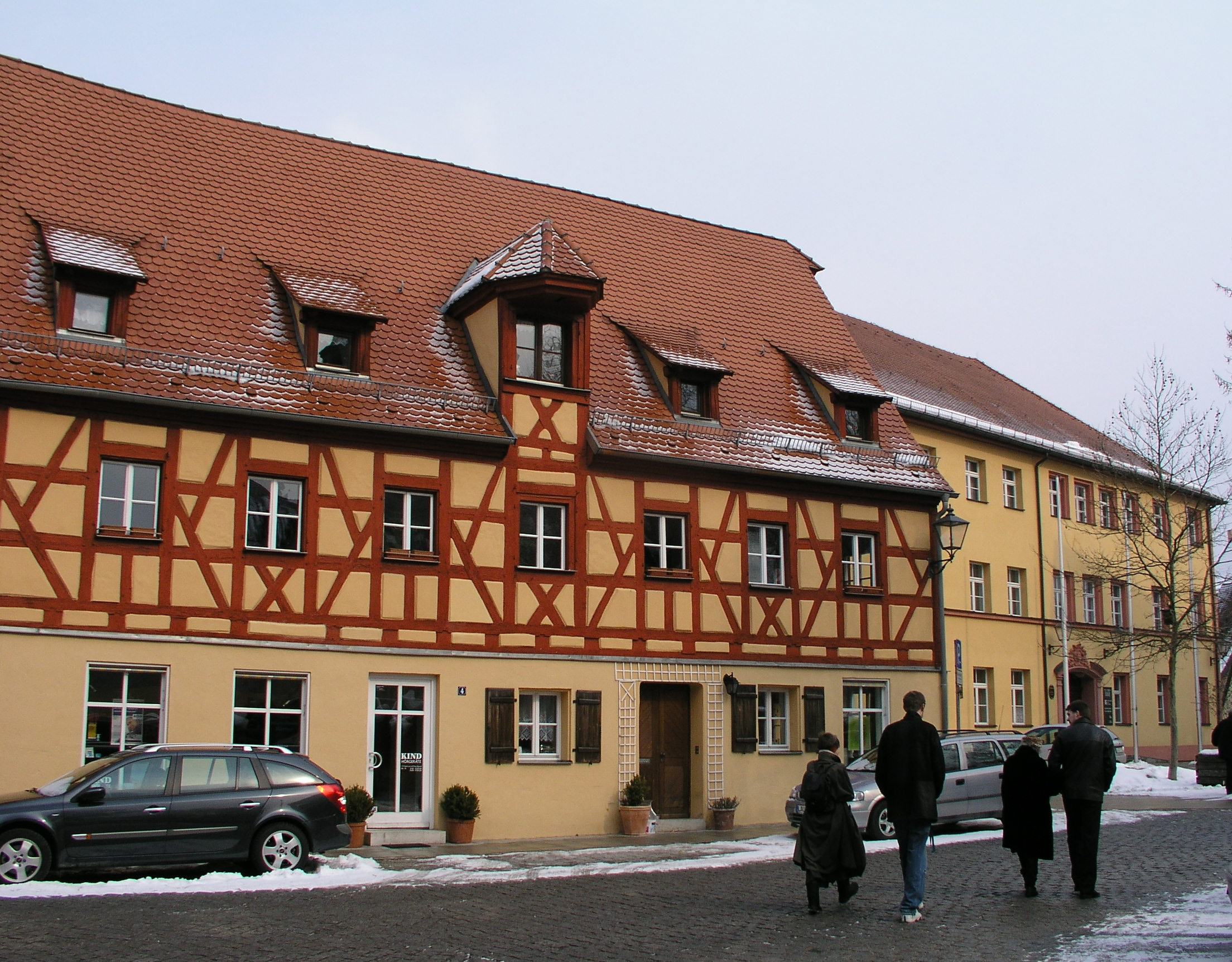 Hersbruck, Schlossbräuhaus der Fachwerkbau (Schlossplatz Nr. 4) war bis 1765 das Brauhaus am Schloss, dann bis 1809 Salzstadel und später Lichtspielhaus (Kino). Im Bildhintergrund rechts oben, ist der Schlossplatz 4a zu sehen. Wohn- und Amtsgebäude des Kastners (Nürnberger Patrizier), der für Verwaltung der Einkünfte, Naturalabgaben usw. zuständig war. Westteil 1982 neu errichtet, der östliche Teil um 1747. Ab 1806 königlich-bayerisches Kastenamt, ab 1808 Rentamt, 1843 zur Schule umgebaut. Relief des Hersbruckers Ludwig Strobel von 1890 über dem Eingang. Heute sind hier die vhs Hersbrucker Land, die Stadtbücherei und die Sitzungssäle der Stadt untergebracht.